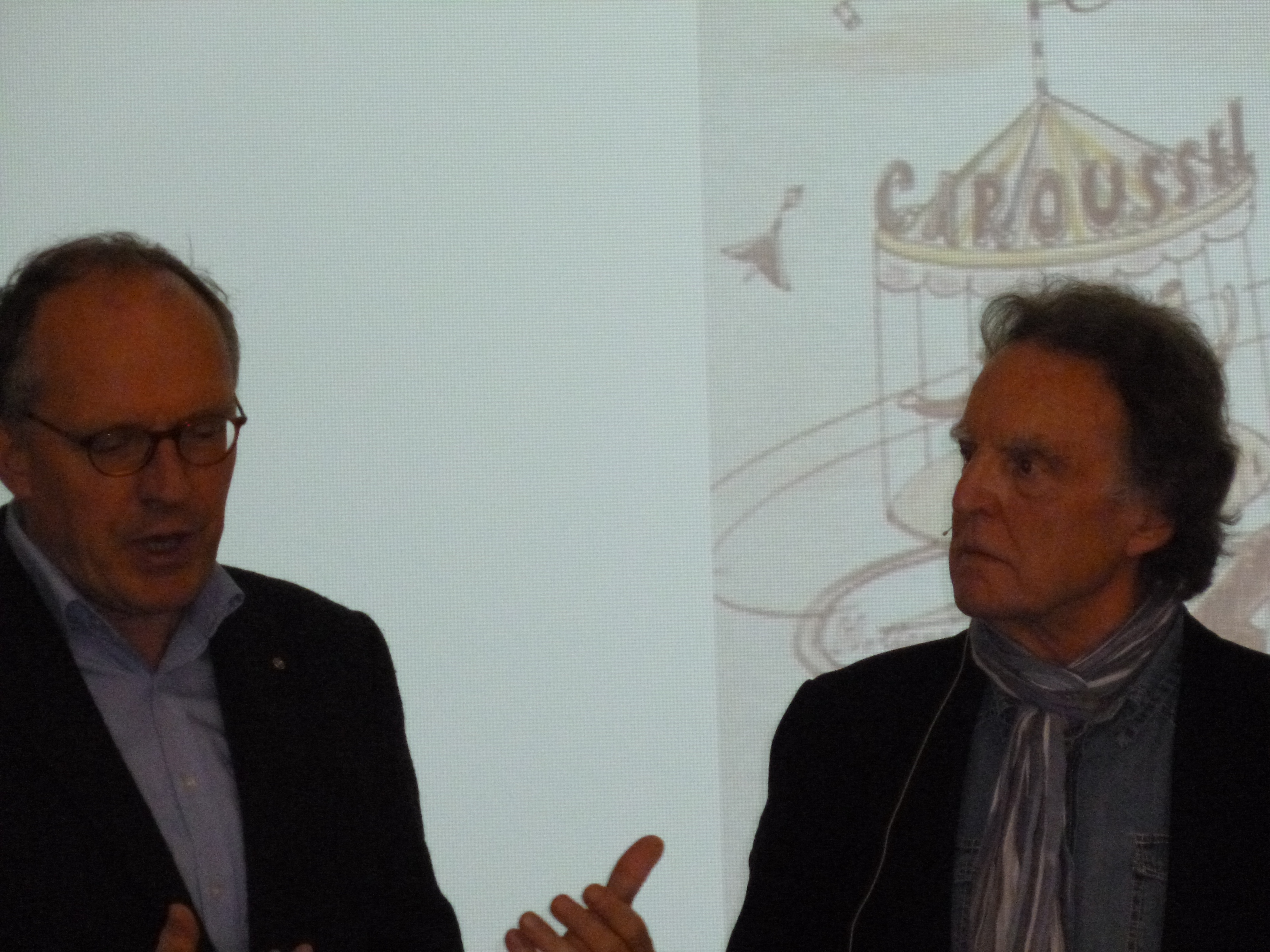 Uri Kaufmann und Roy Kift 2014